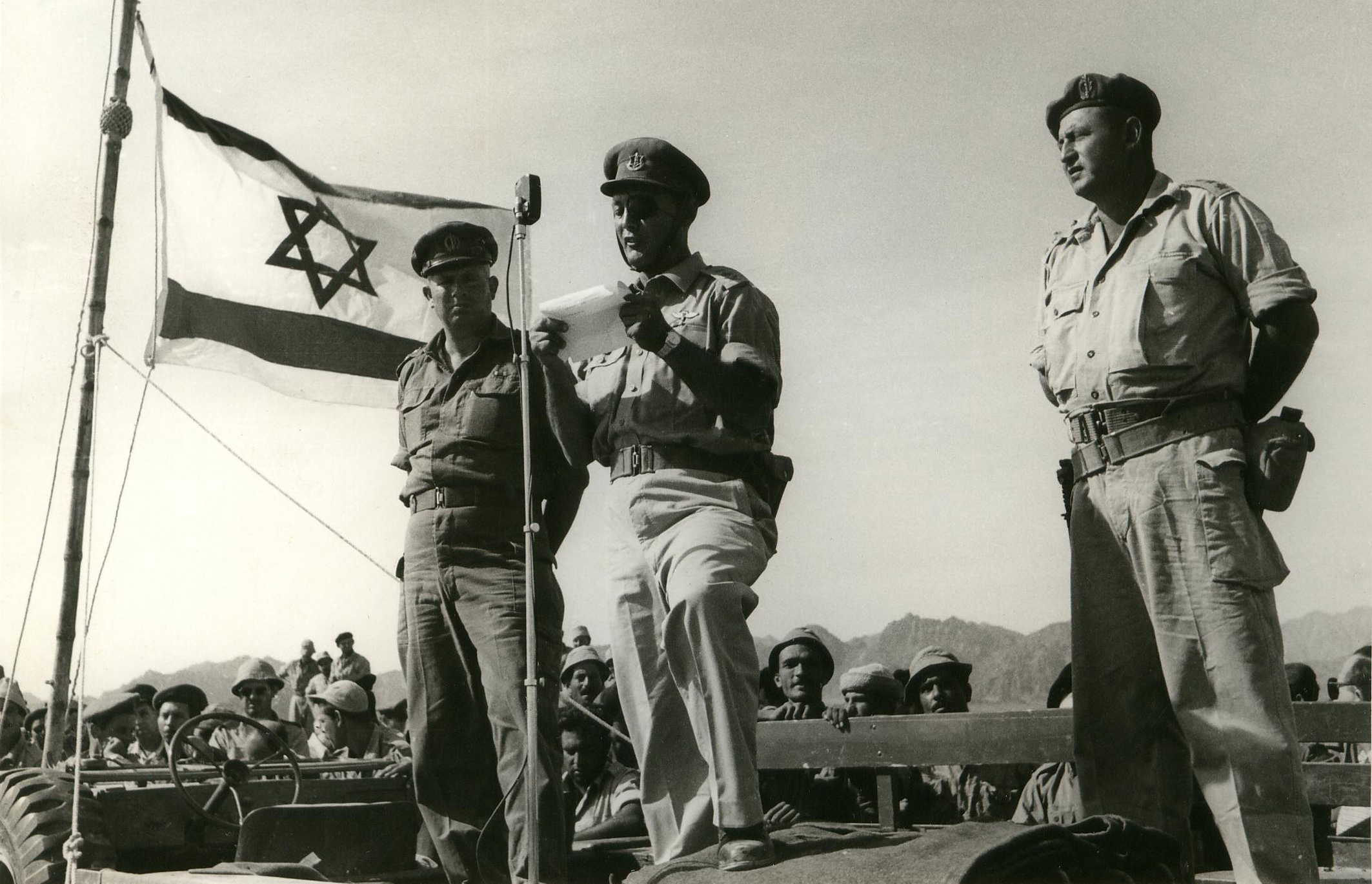 מסדר סיום של חטיבה 9 בשארם א-שייח. מימין לשמאל: אל"מ אברהם יפה - מח"ט 9, רא"ל משה דיין, הרמטכ"ל, אל"מ אסף שמחוני מפקד פקוד דרום.